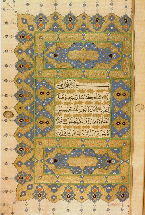 Holy Koran covering by Ahmed Karahisari, kept at the Topkapi Palace.